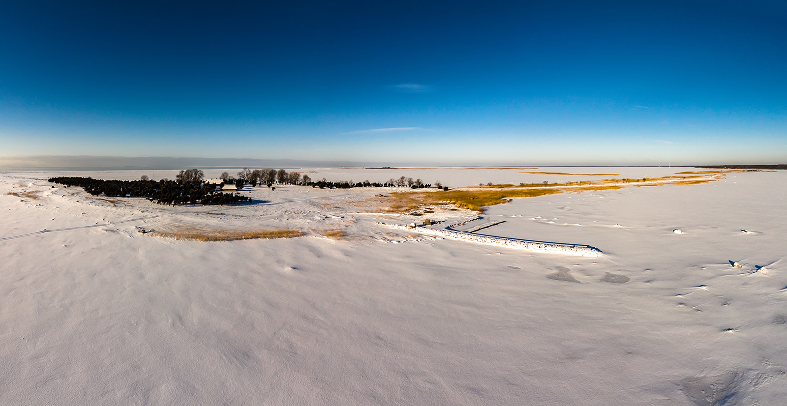 Pihelgalaid